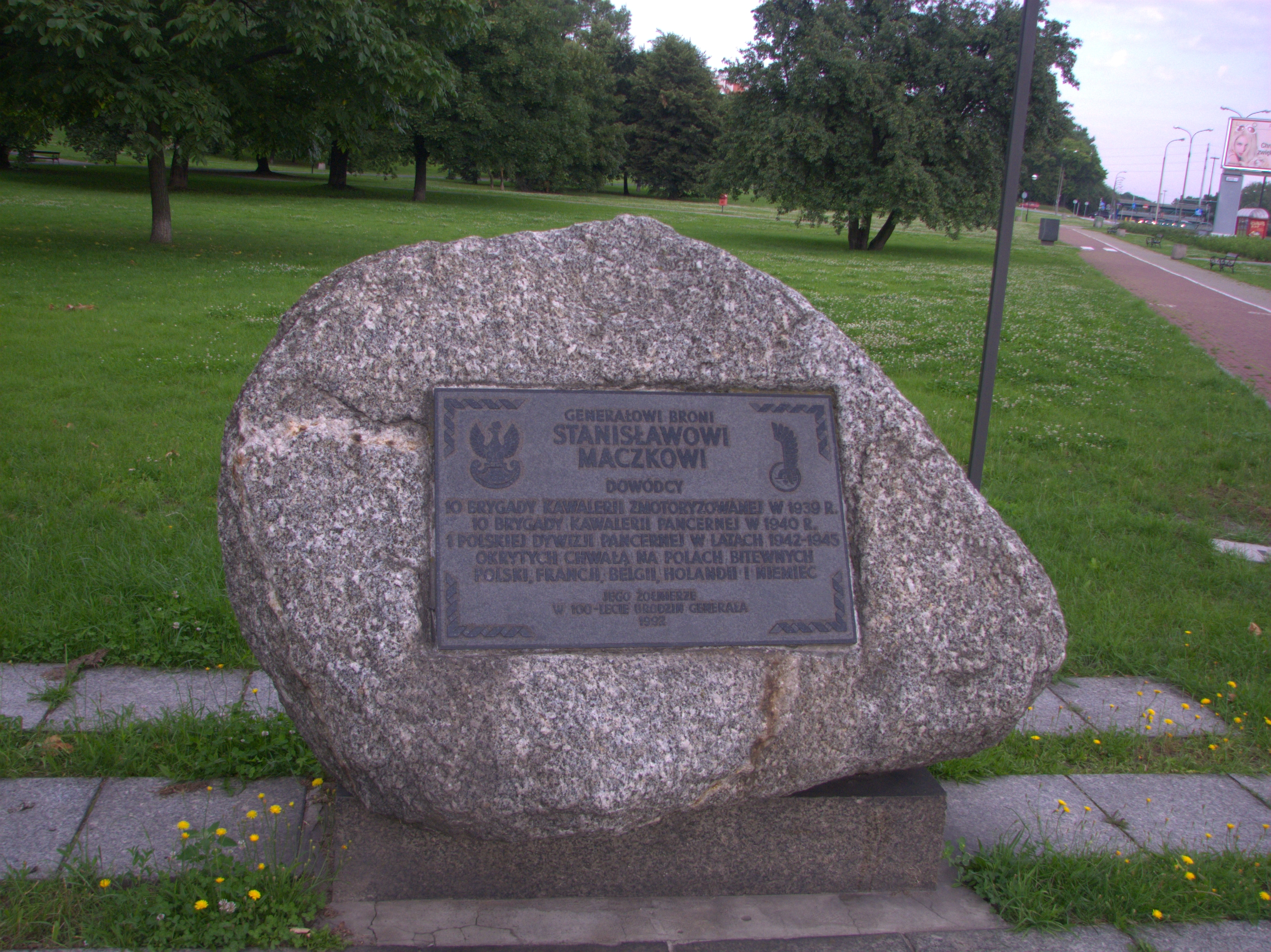 Kamień upamiętniający generała broni Stanisława Maczka w Warszawie.